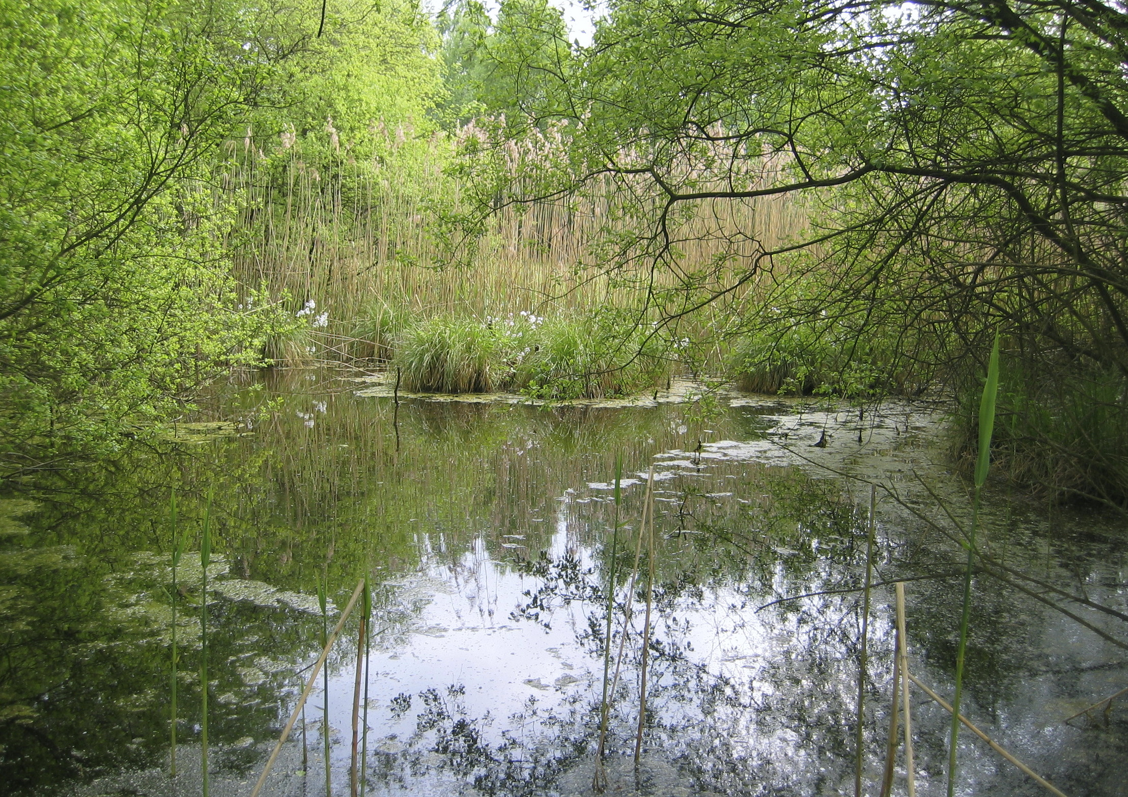 Kleingewässer und Schilfrohr-Bestand (Phragmites australis) im NSG Kiebitzteich, Reelsen, Bad Driburg, Deutschland. In der Bildmitte einige Bulte der Rispen-Segge (Carex paniculata).